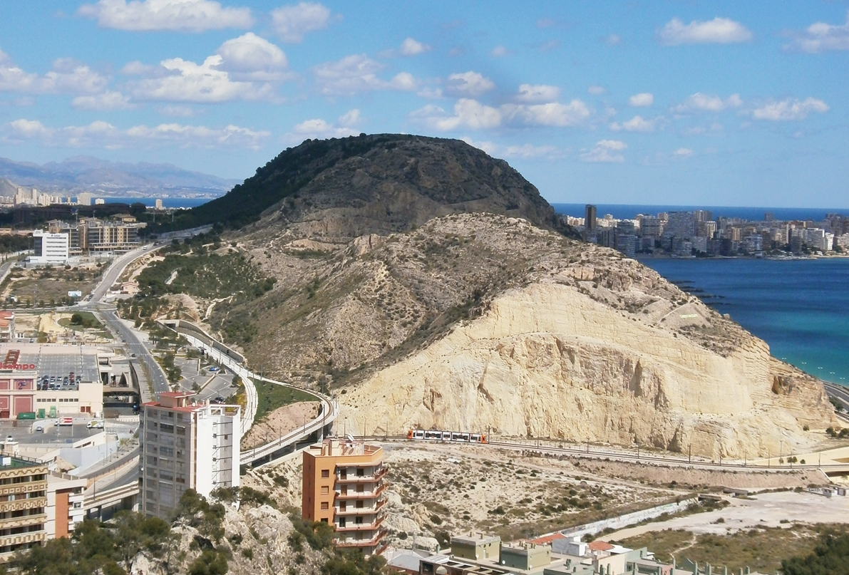 Vista de la Serra Grossa desde el Castillo de Santa Bárbara, Alicante, España.